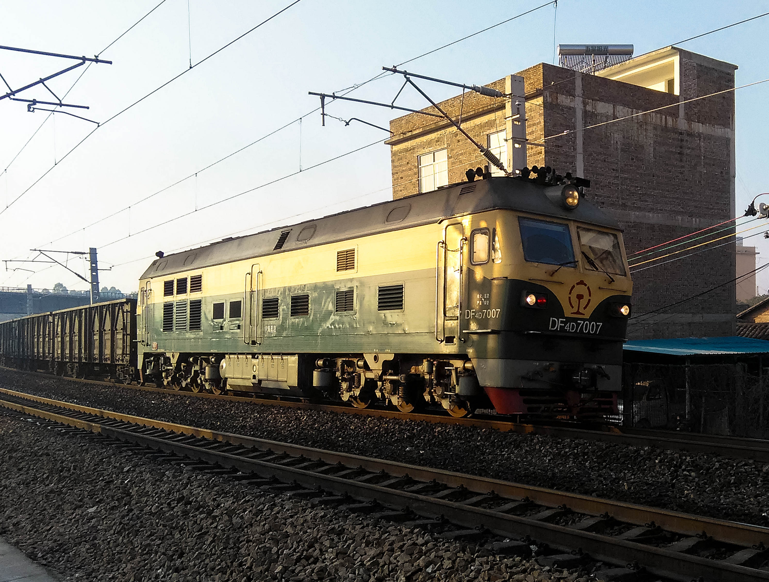 晨光下的7007号东风4D型内燃机车